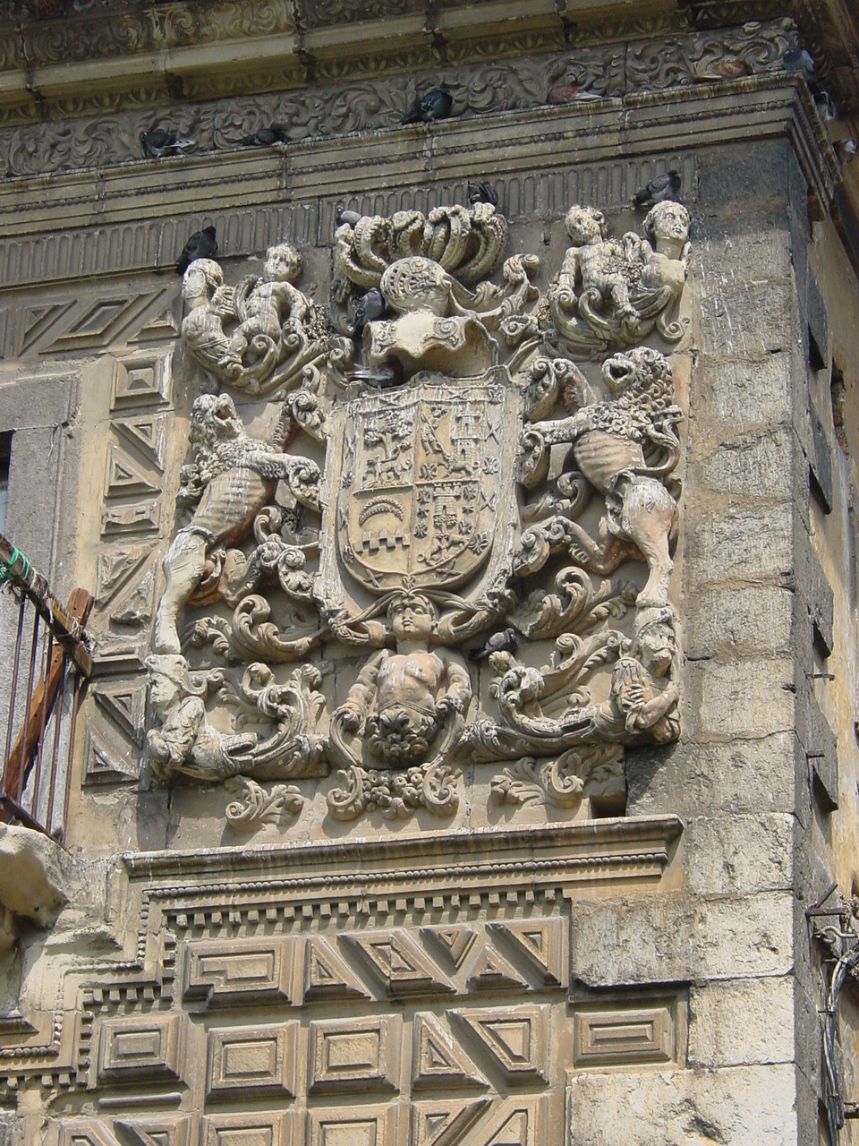 Escudo del palacio de Chiloeches en Santoña, Cantabria, España.